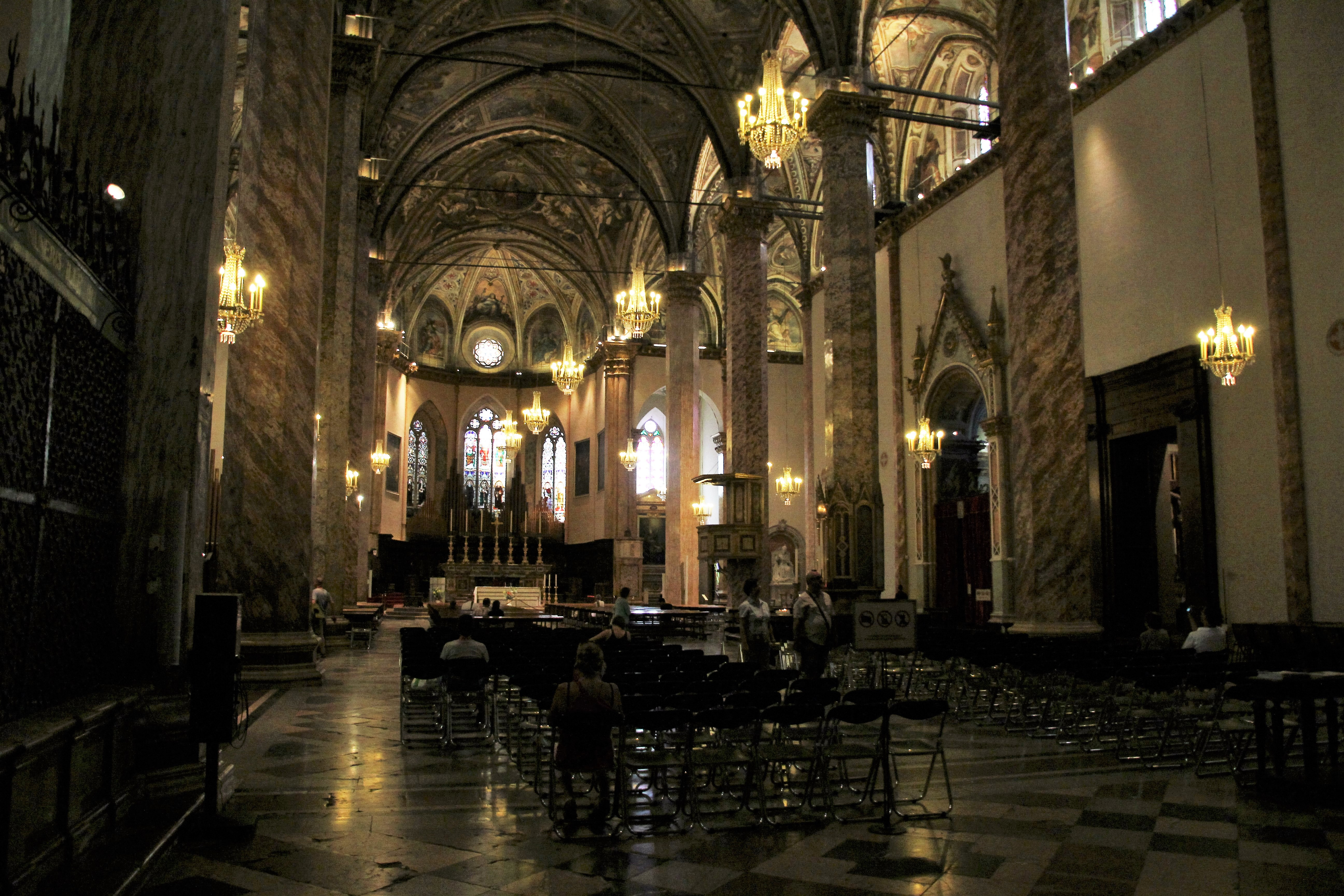 Perugia, cattedrale di San Lorenzo